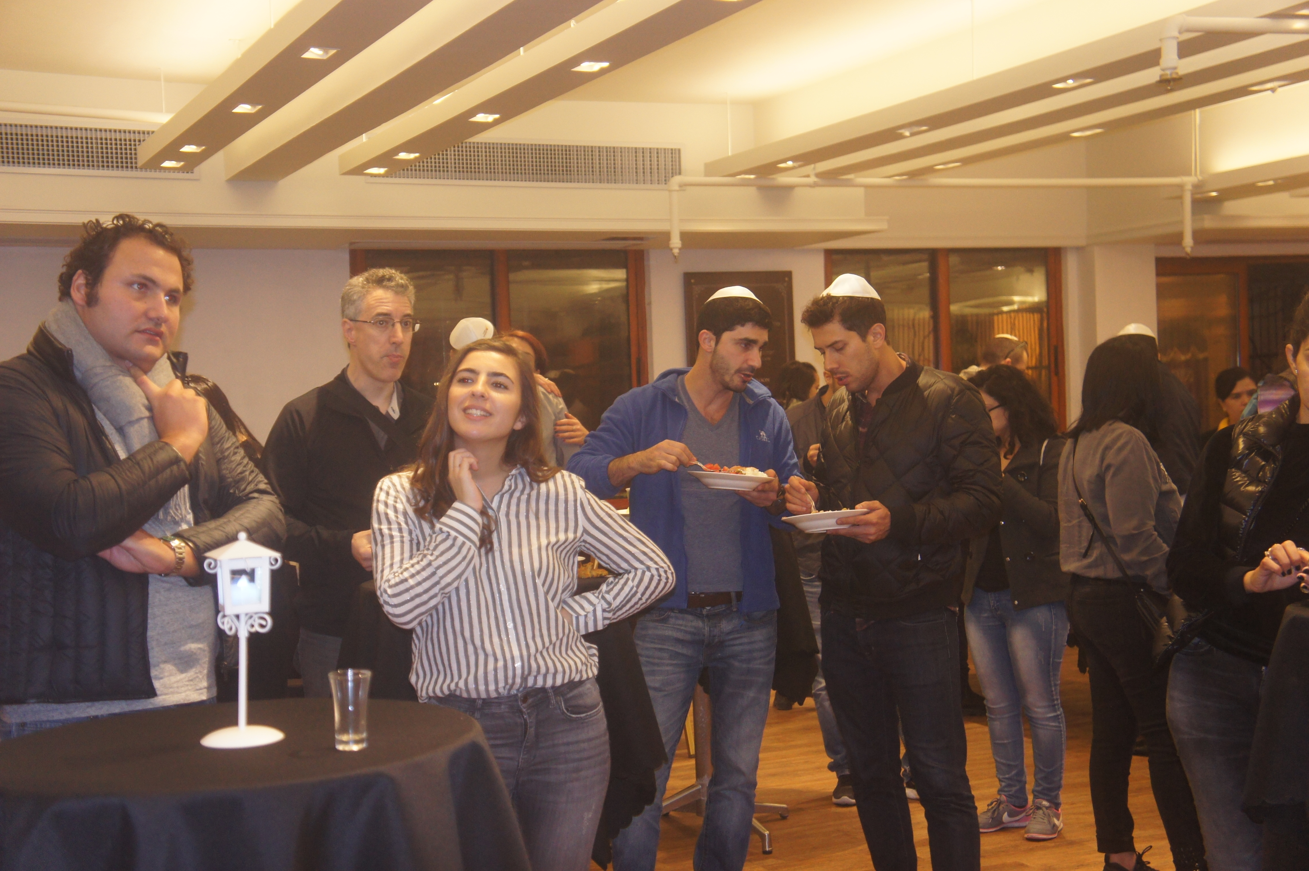 אירוע חנוכה 2017 בבית חב"ד קאולון